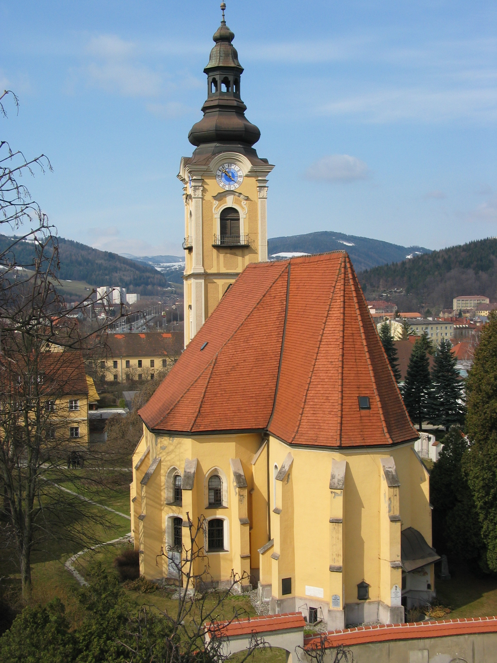 St. Jakob von der Ostseite